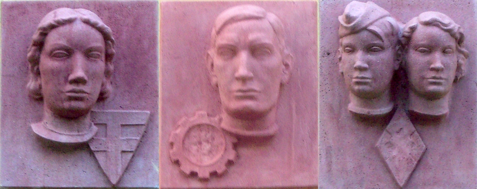 Zusammenstellung von drei Hochreliefs an Türstürzen in Augsburg-Hochfeld, Von-Richthofen-Straße 24–34, Baujahre 1936/37. Links: Frauenkopf mit Symbol der NS-Frauenschaft. Mitte: Männerkopf mit Symbol der Deutschen Arbeitsfront. Rechts: Jungen- und Mädchenkopf mit Symbol der Hitlerjugend (und Jungmädelbund). Die in allen drei Symbolen enthaltenen Hakenkreuze wurden ca. 1960 herausgeschlagen; Reste sind noch erkennbar.